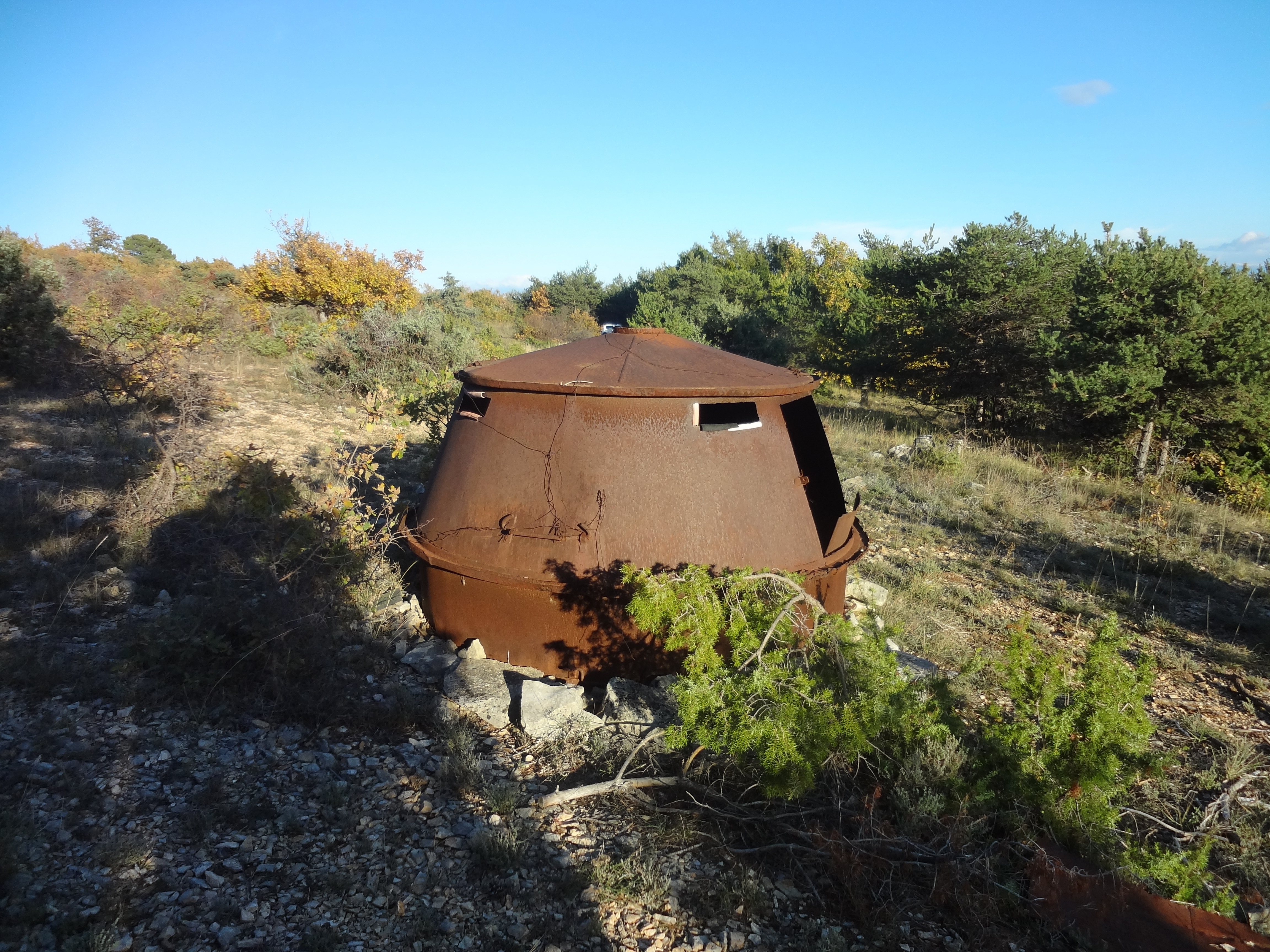 Charbonnière de fonte, à Revest-Saint-Martin, servant à fabriquer du charbon de bois.